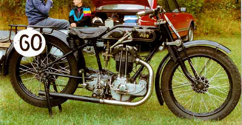 AJS